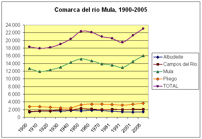 Población de Albudeite (azul) en el contexto de la comarca (total en lila) The population of the Comarca del Río Mula region in Murcia, Spain, (1900-2005). Totals of the region, Mula, Albudeite, Campos del Río, and Pliego. Own work, given to PD. Source: Instituto Nacional de Estadística.